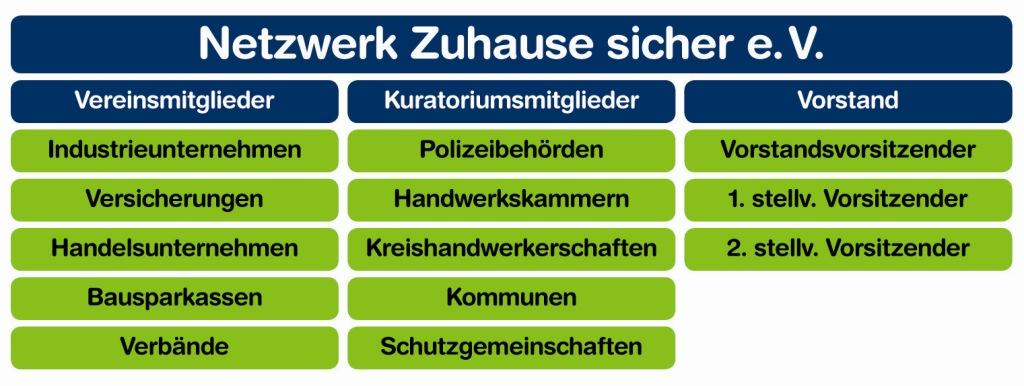 Diagramm